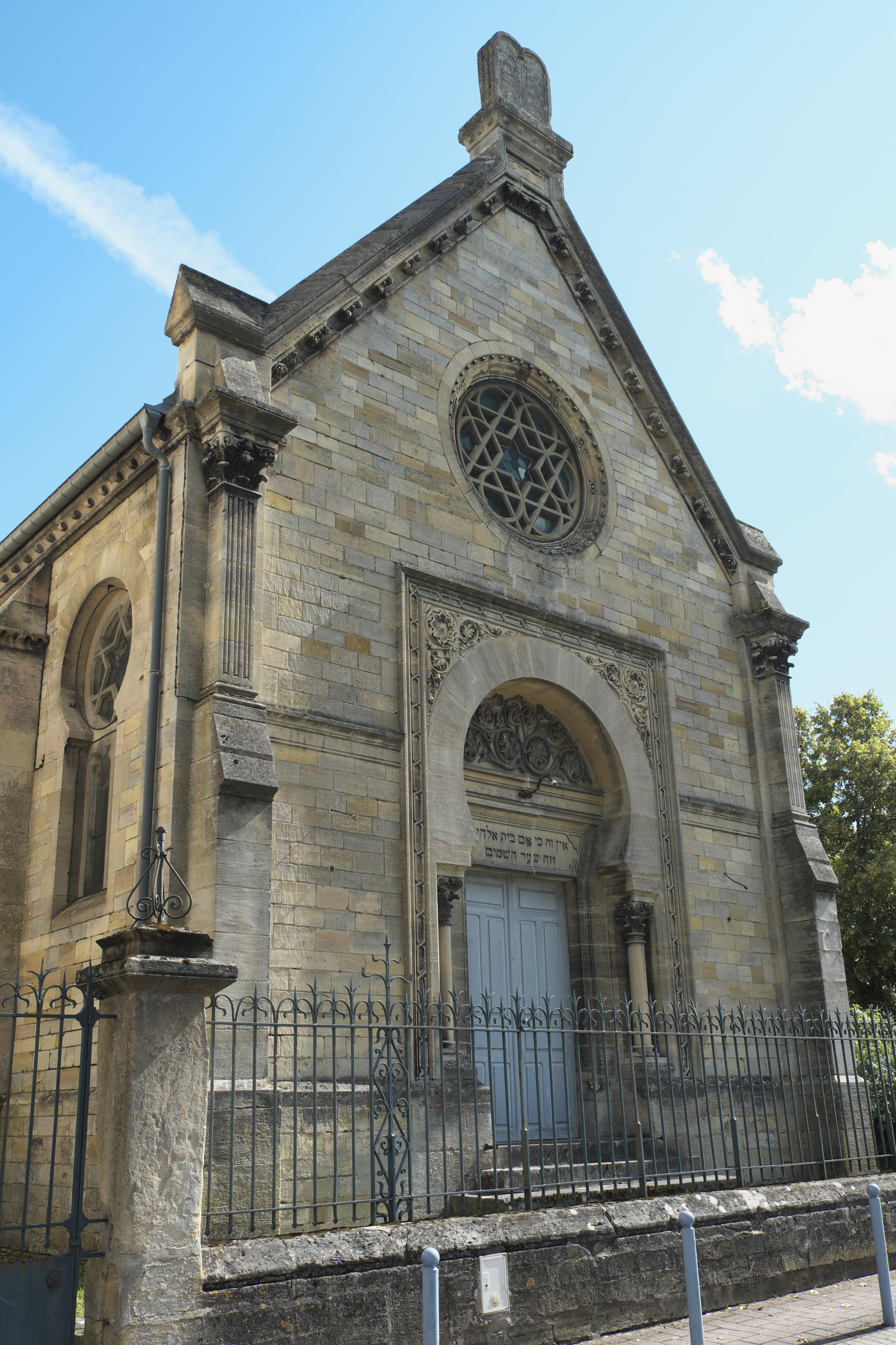 Synagoge in Bar-le-Duc im Département Meuse (Lothringen/Frankreich) .